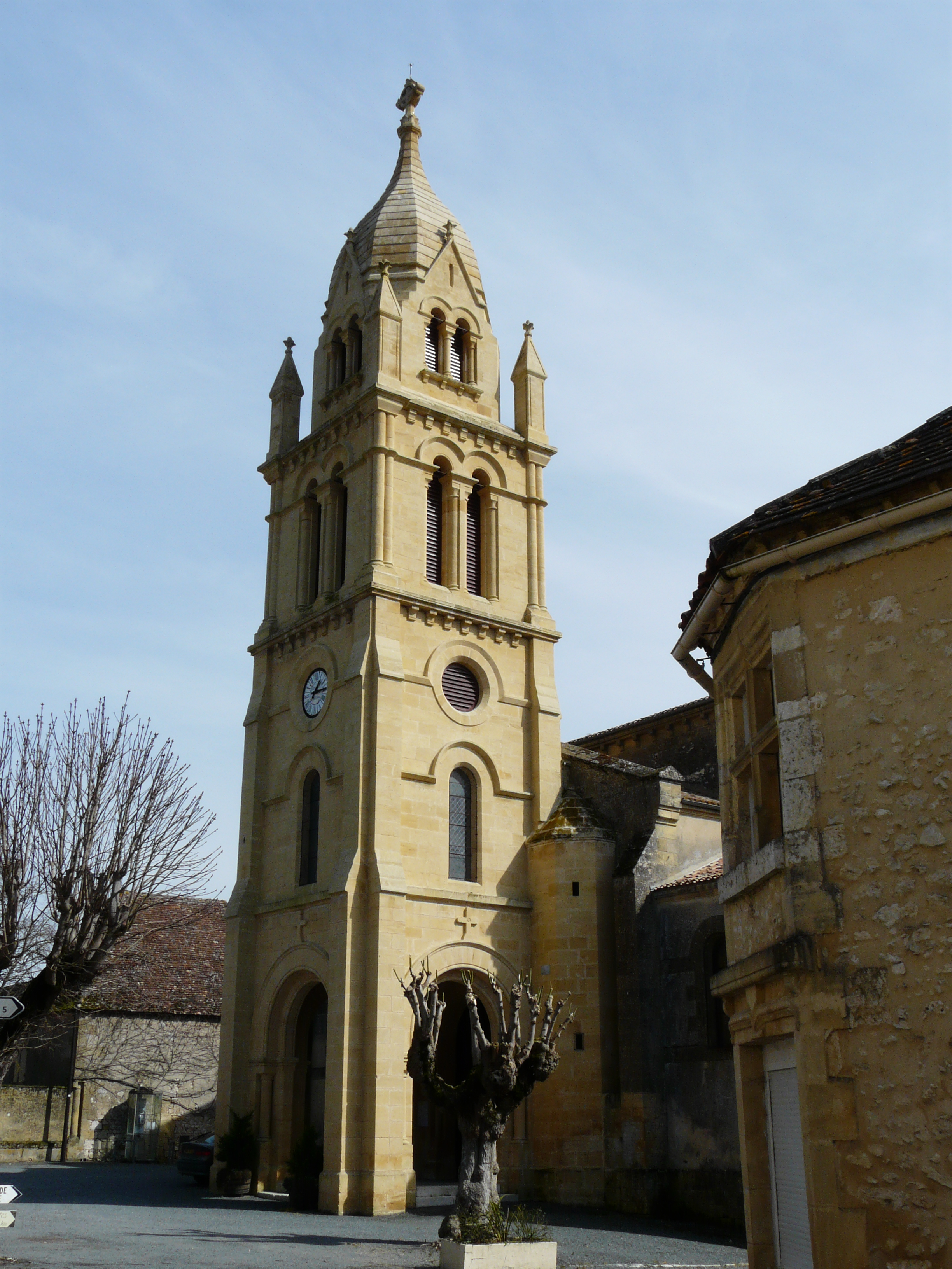 Le clocher de l'église Saint-Saturnin, Faux, Dordogne, France.